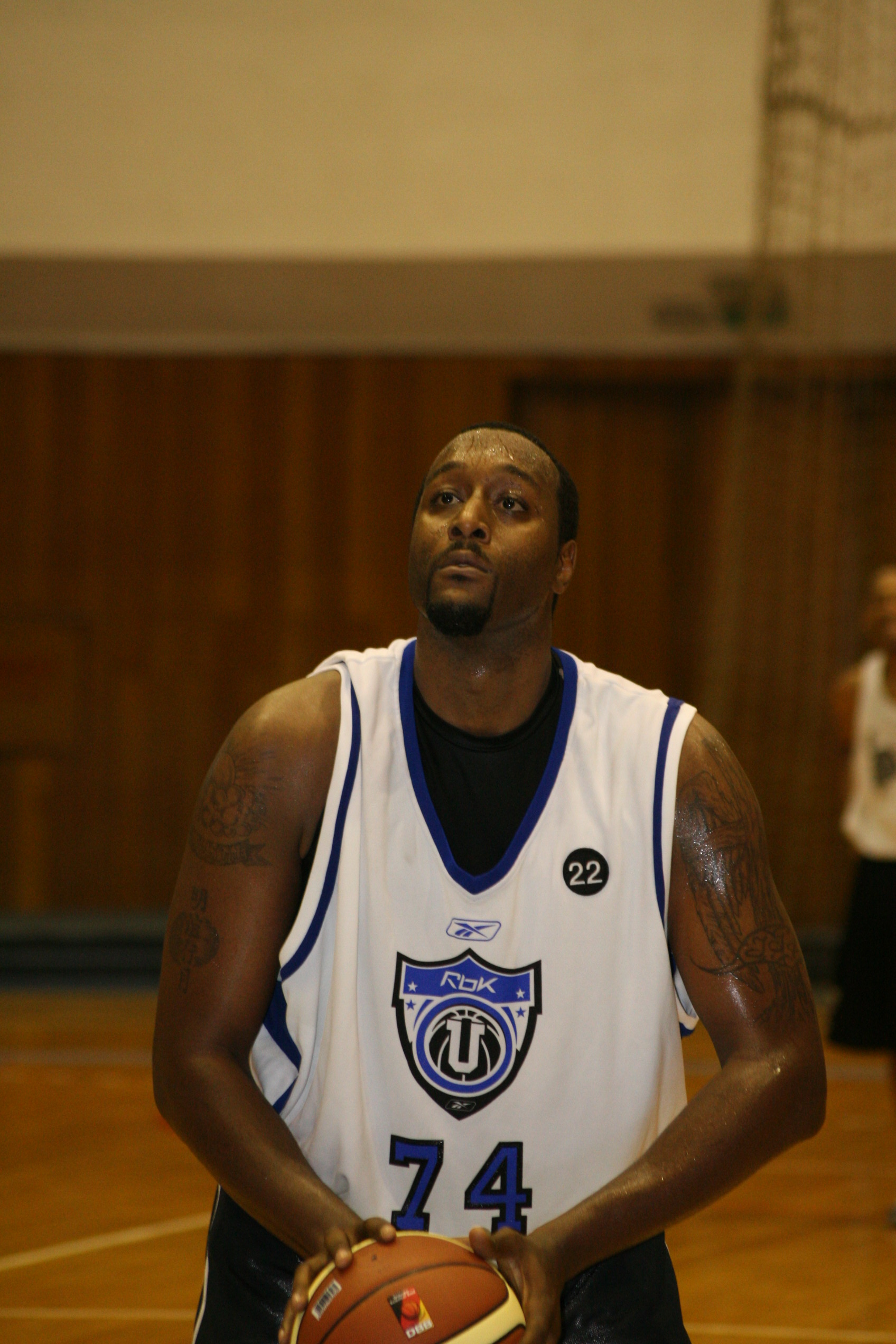 Troy Selvey